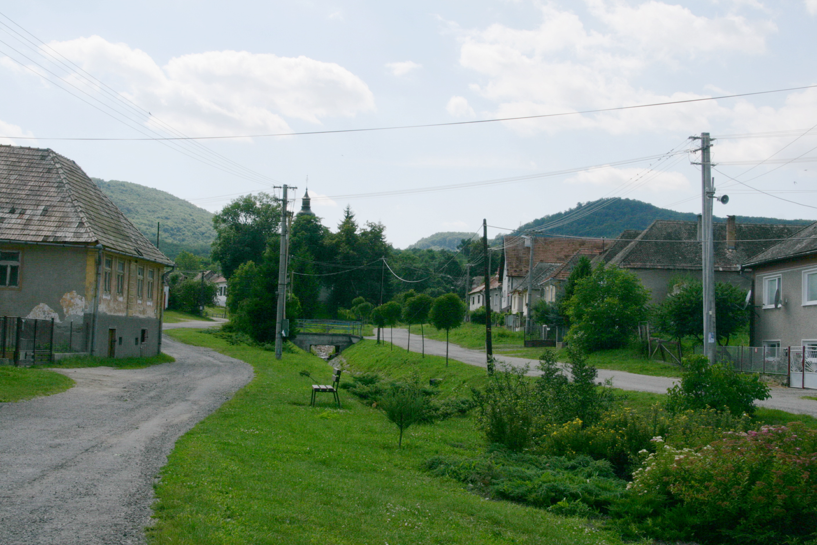 Perjése - utcakép